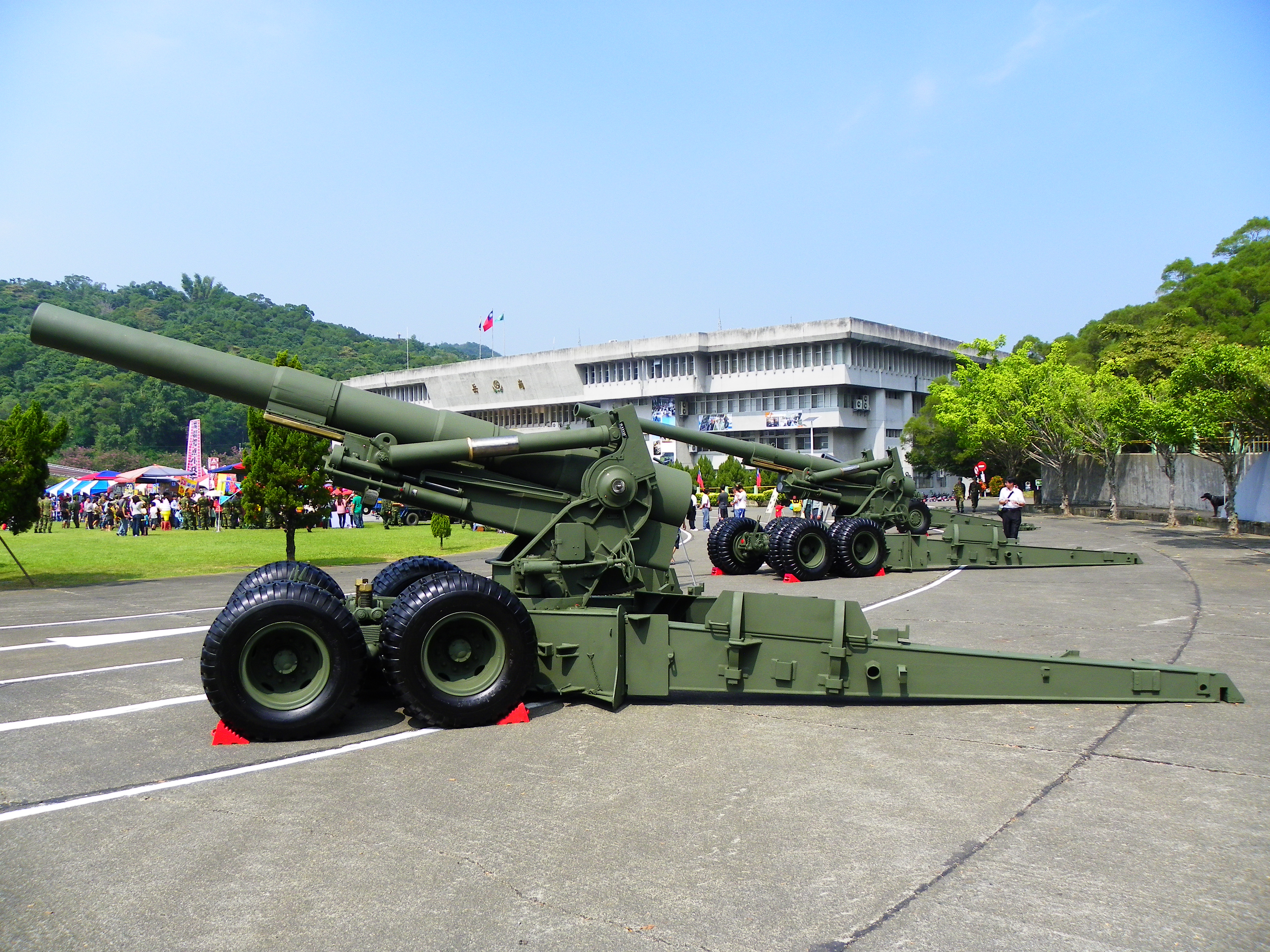 2012年兵整中心營區開放活動，展示之M115 203mm榴彈砲（前）與M59A2 155mm加農砲（後）。